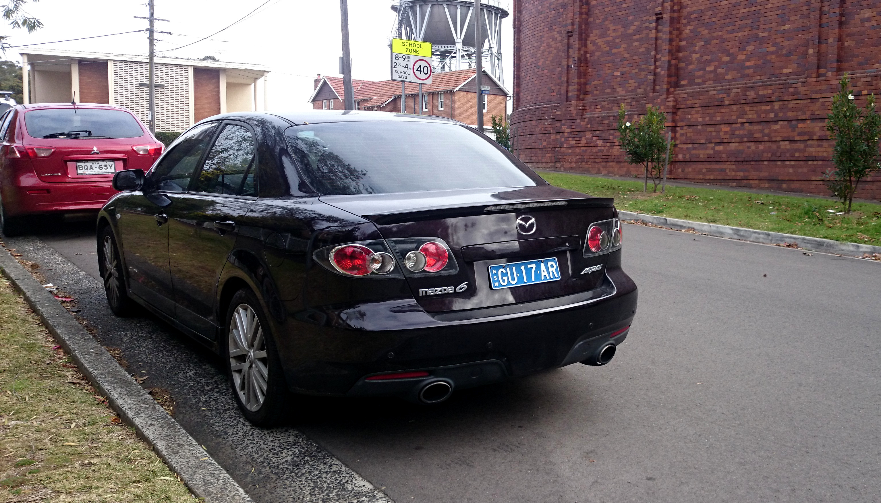 Mazda 6 MPS